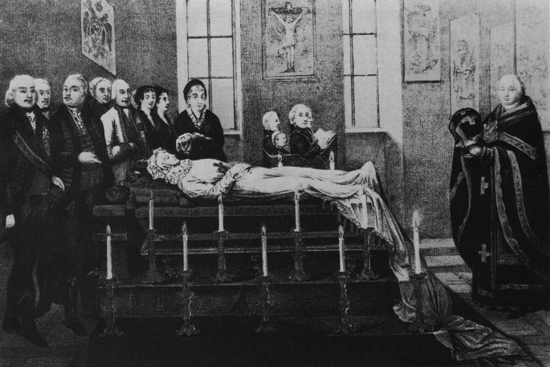 Погребение великой княгини Александры Павловны в Буде